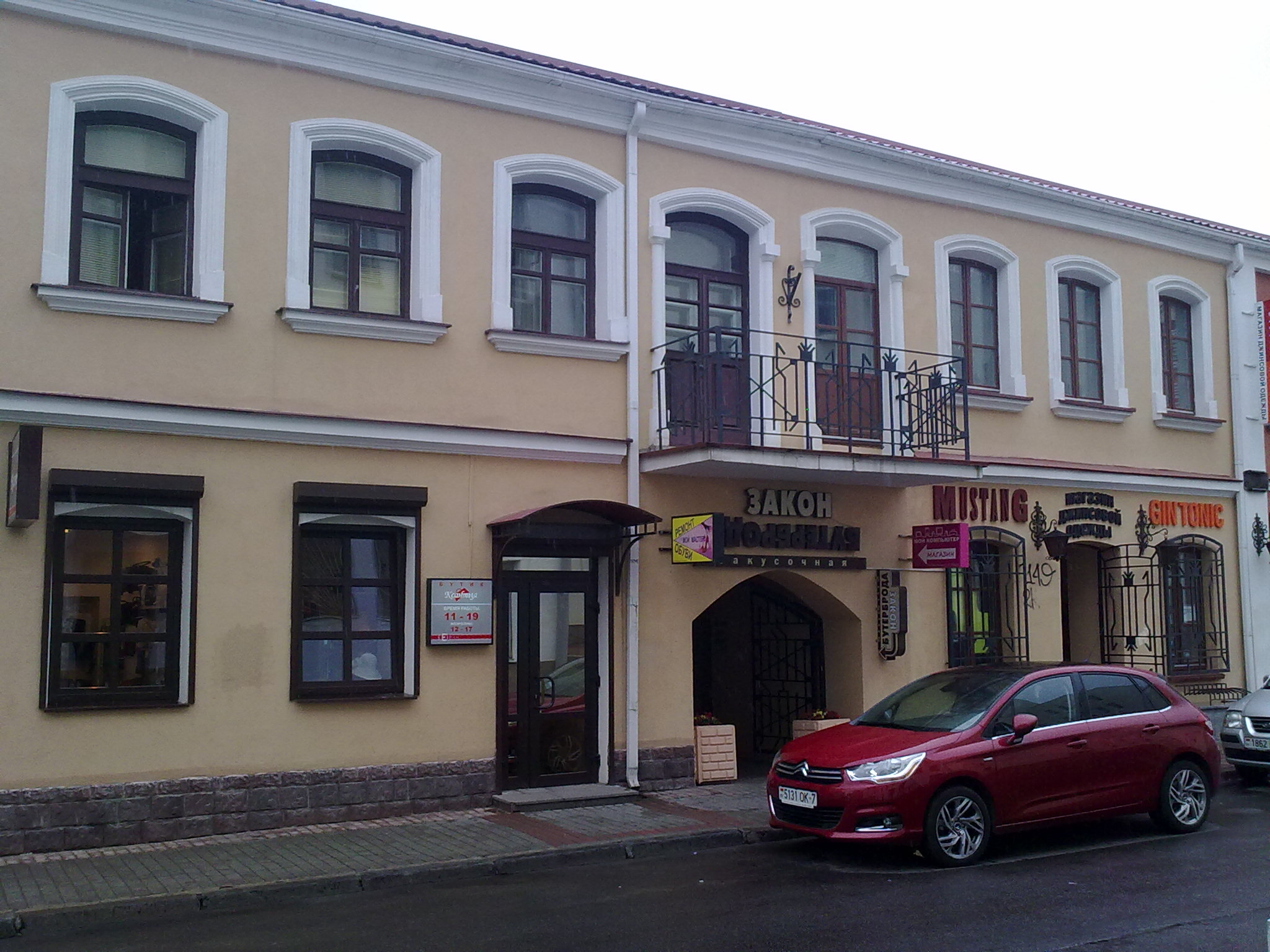 Мінск. вуліца Рэвалюцыйная. 2012